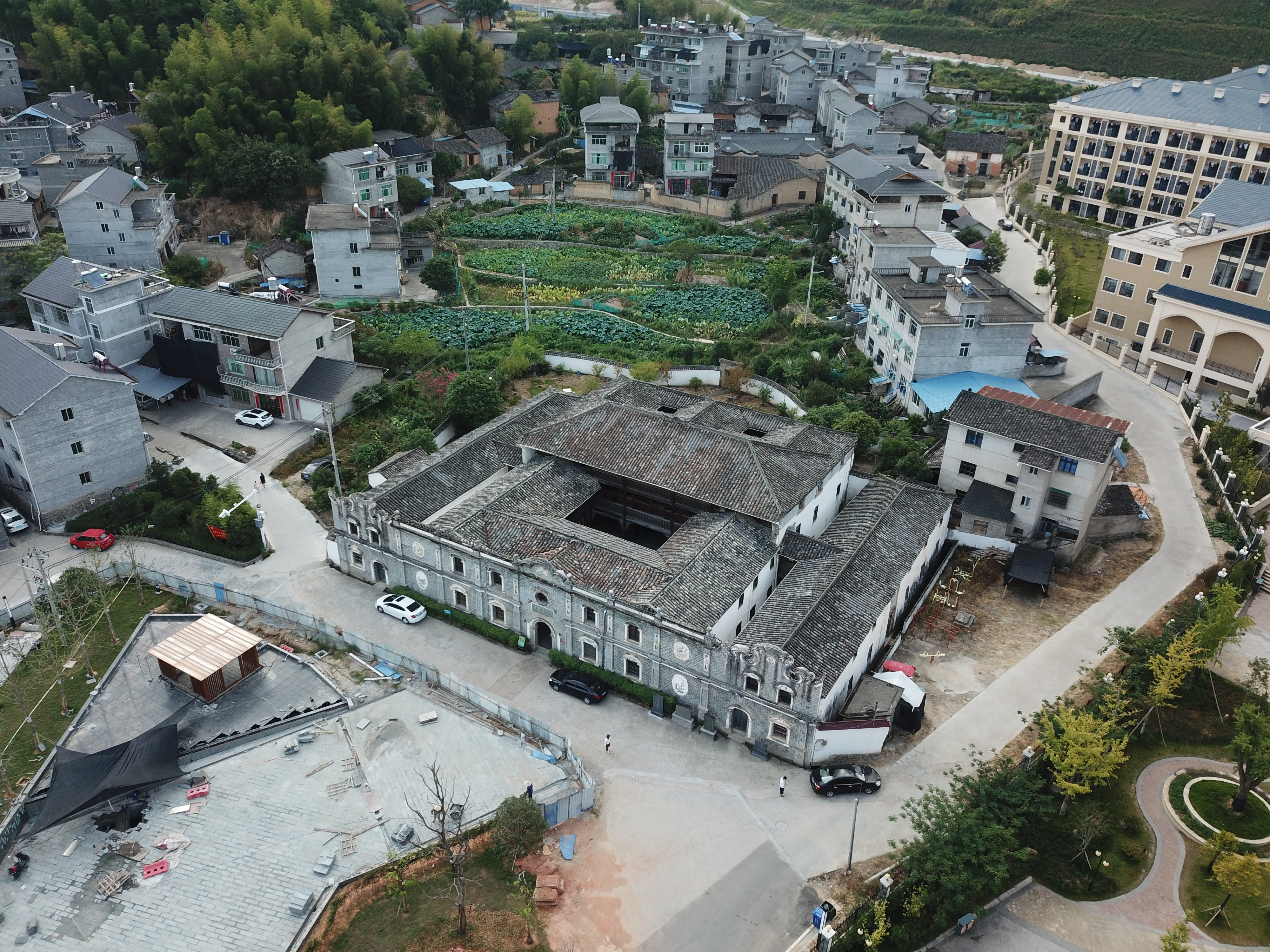 龙泉·浙江大学龙泉分校旧址